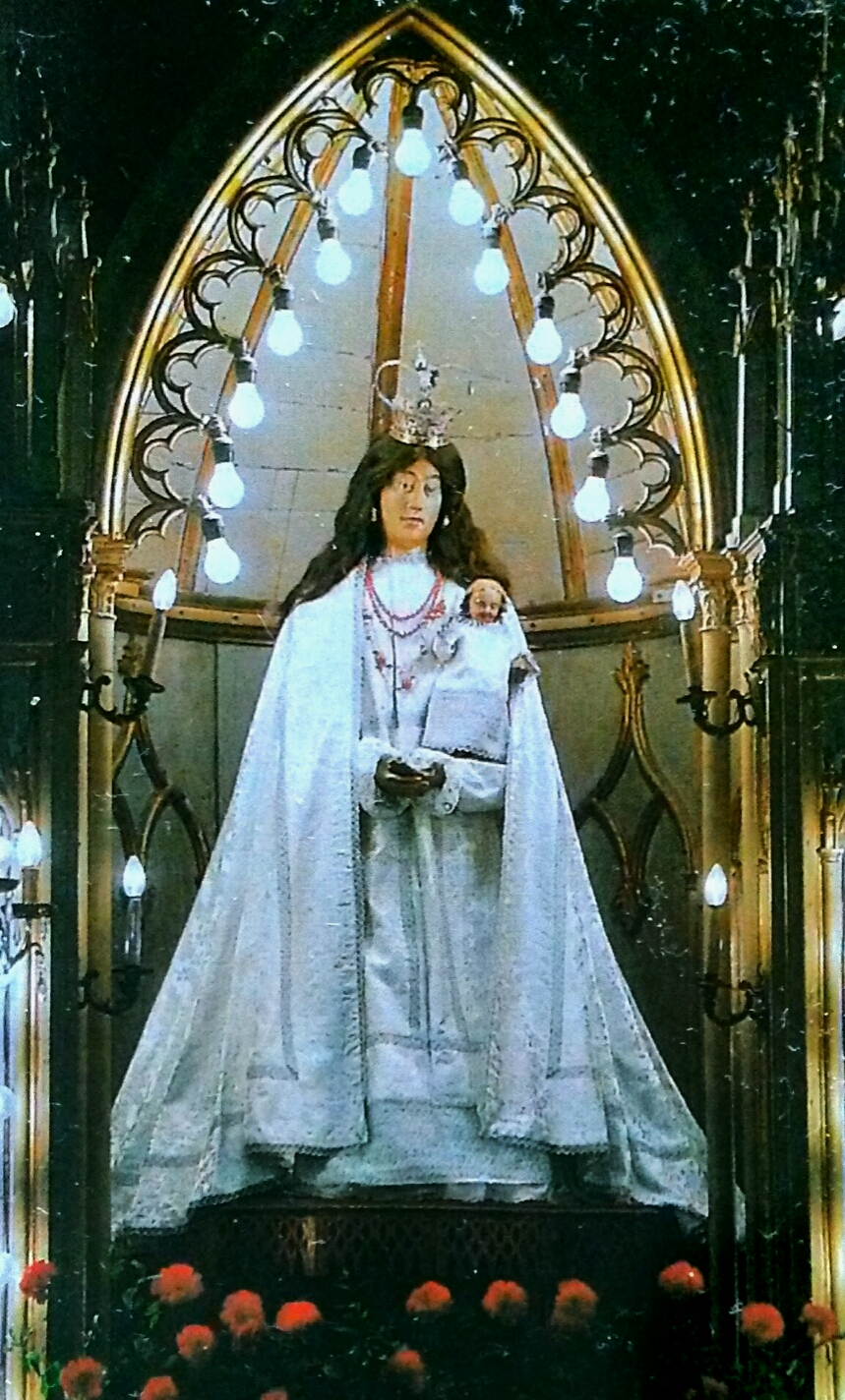 Talla del siglo XIX de la Virgen de los Remedios en la Capilla de los Remedios, en Orense. La talla resultó destruida en un incendio el 28 de julio de 2010 (la imagen consiste en una foto sacada a una fotografía de mi propiedad tomada por mí con una cámara analógica en la década de 2000).